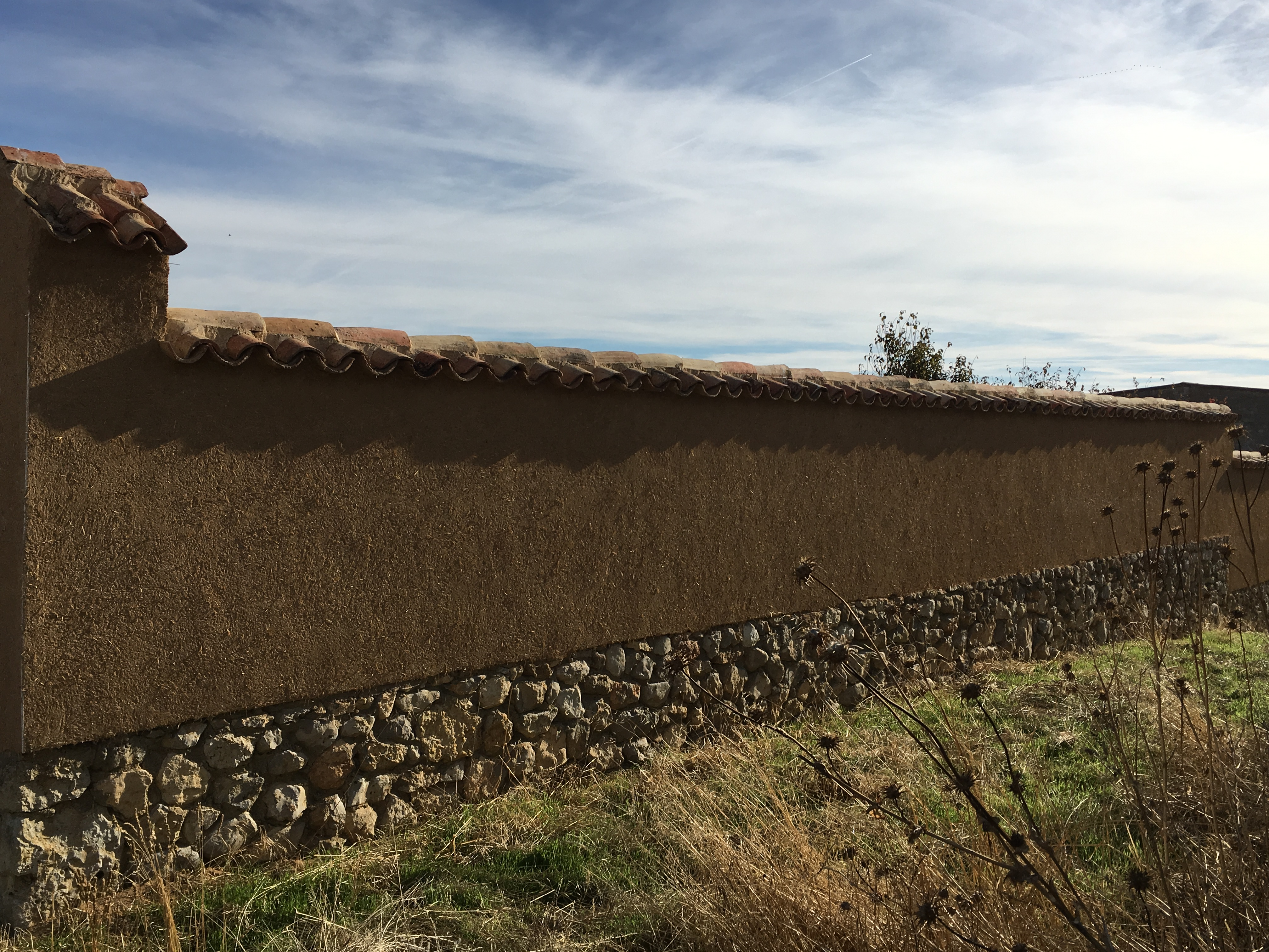 Villaesper Milenario